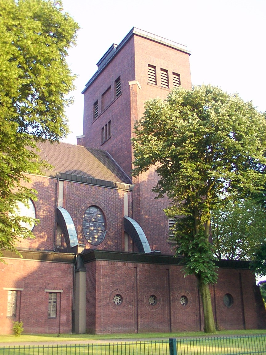 Castrop-Rauxel: katholische Kirche Sankt Antonius in Ickern, Fenster nach Entwürfen von Hubert Spierling, Ausführung der Fenster von der Glasmalerei Peters (Paderborn)